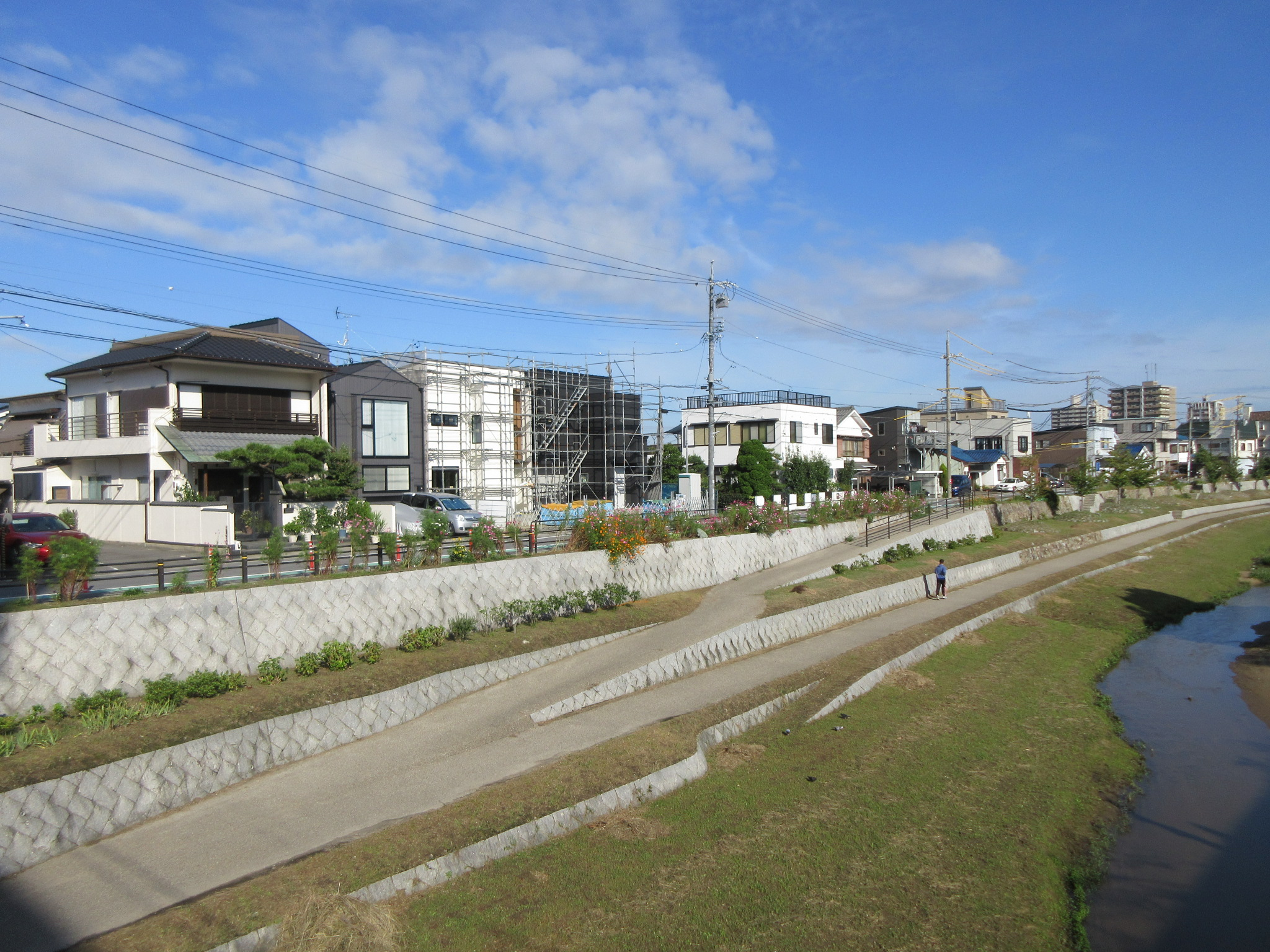 柿田橋付近（岡崎市西魚町、城北町）